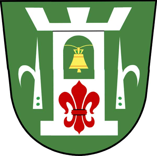 Znak obce Kupařovice